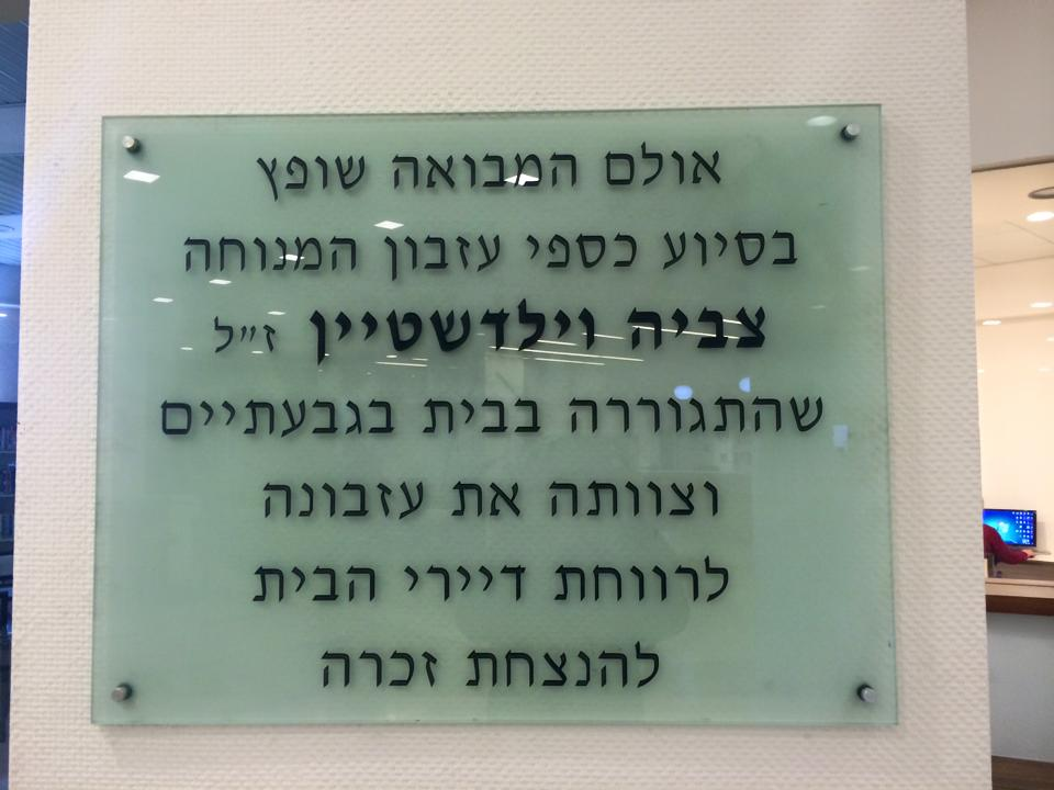 לוח הנצחה מזכוכית שנמצא ב"משען" גבעתיים כתודה לתרומתה של צביה למקום